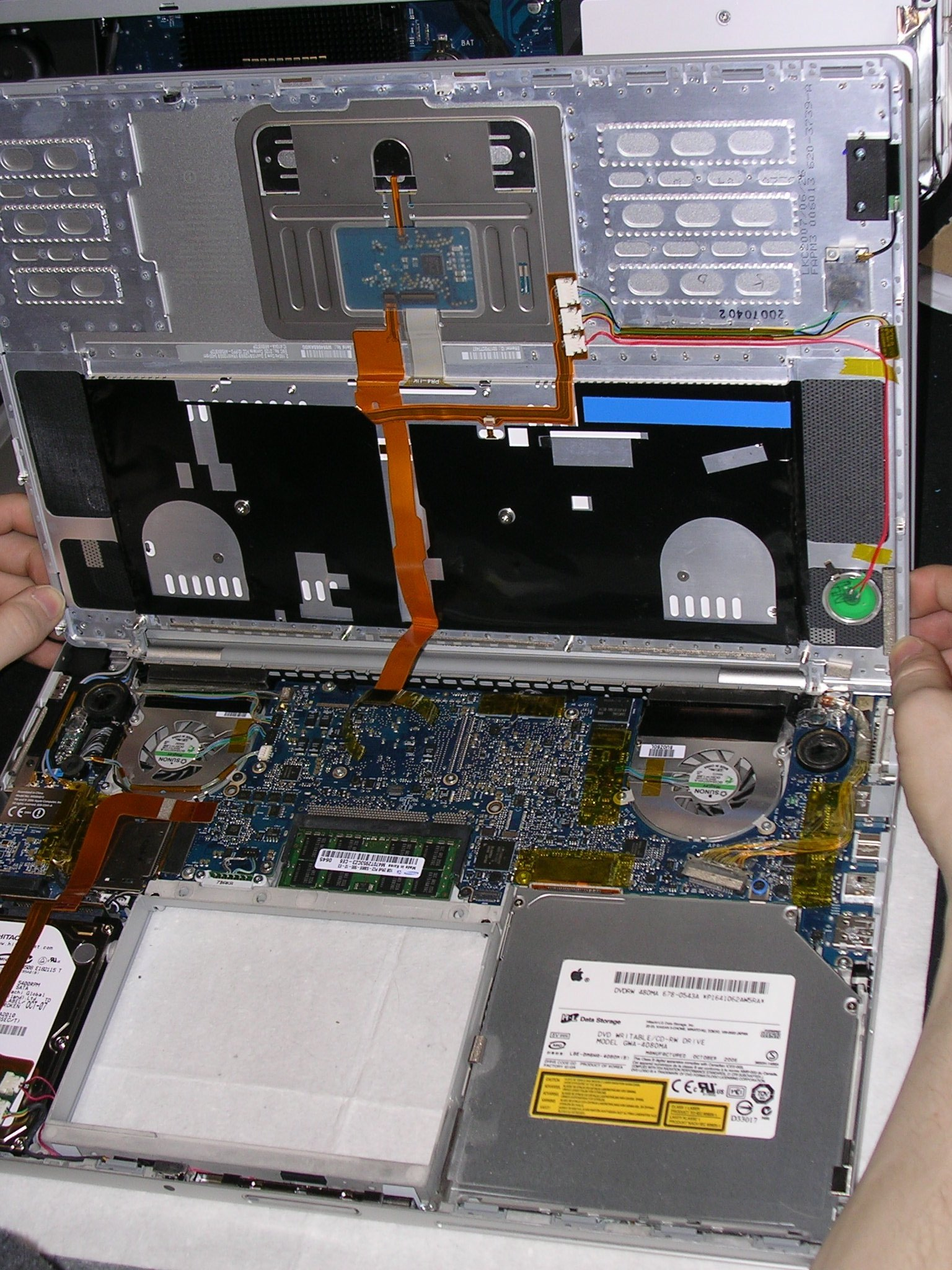 MacBook Pro 15 Zoll, inside view